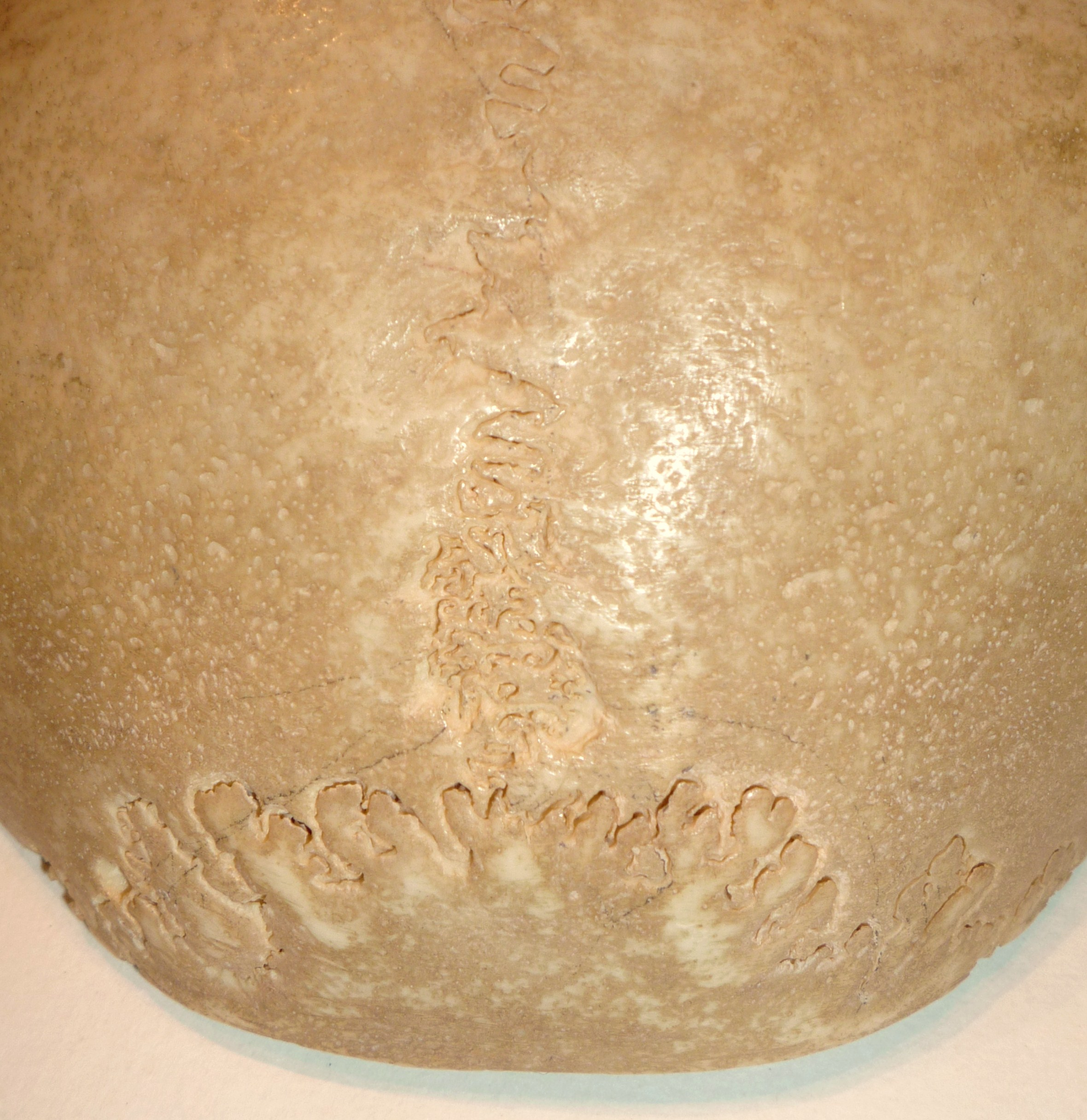 Suture dentate del cranio: tra le due ossa parietali e tra occipitale e parietali